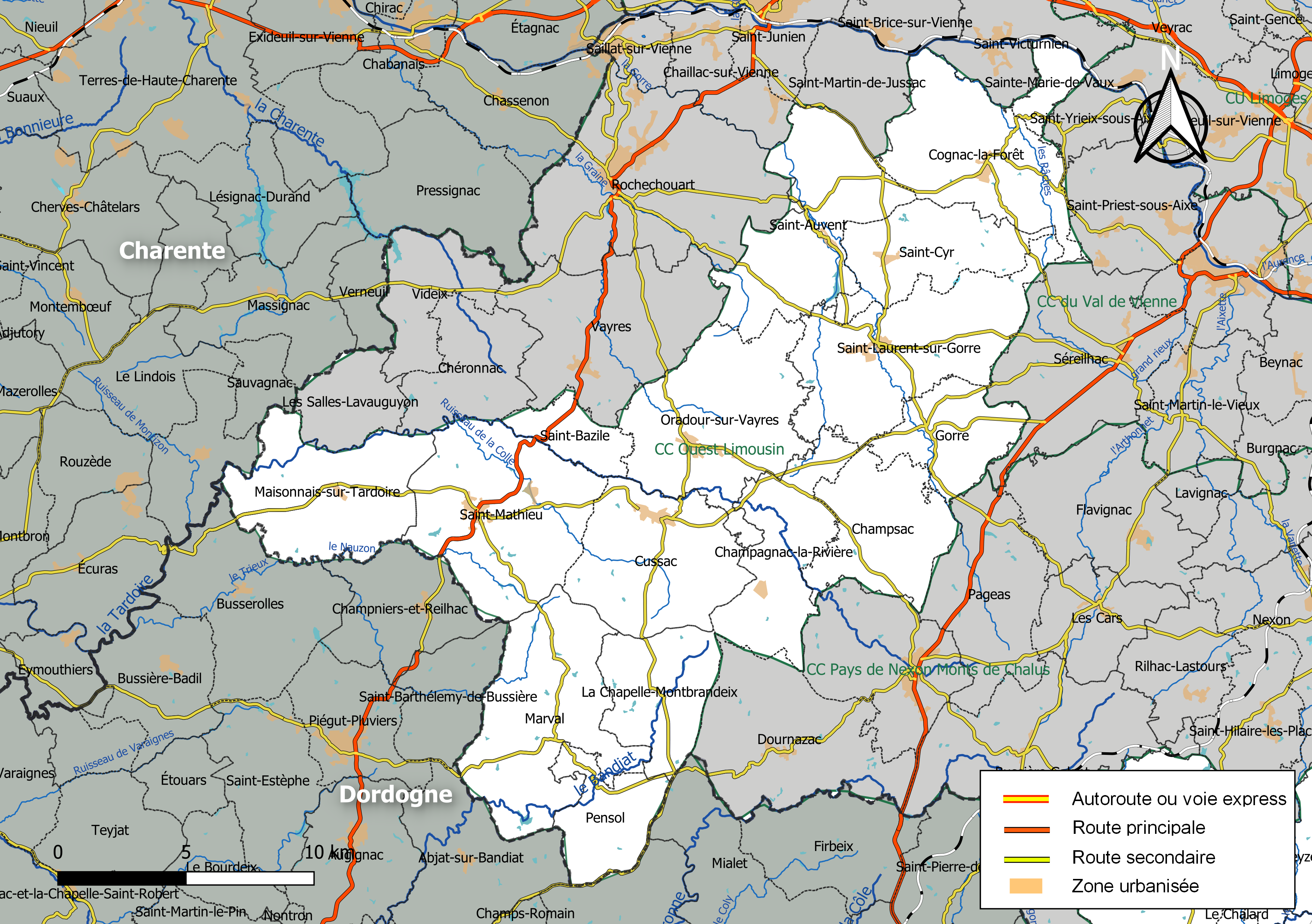 Carte géographique de la Communauté de communes Ouest Limousin, département de la Haute-Vienne, France. Composition au 1er janvier 2019.